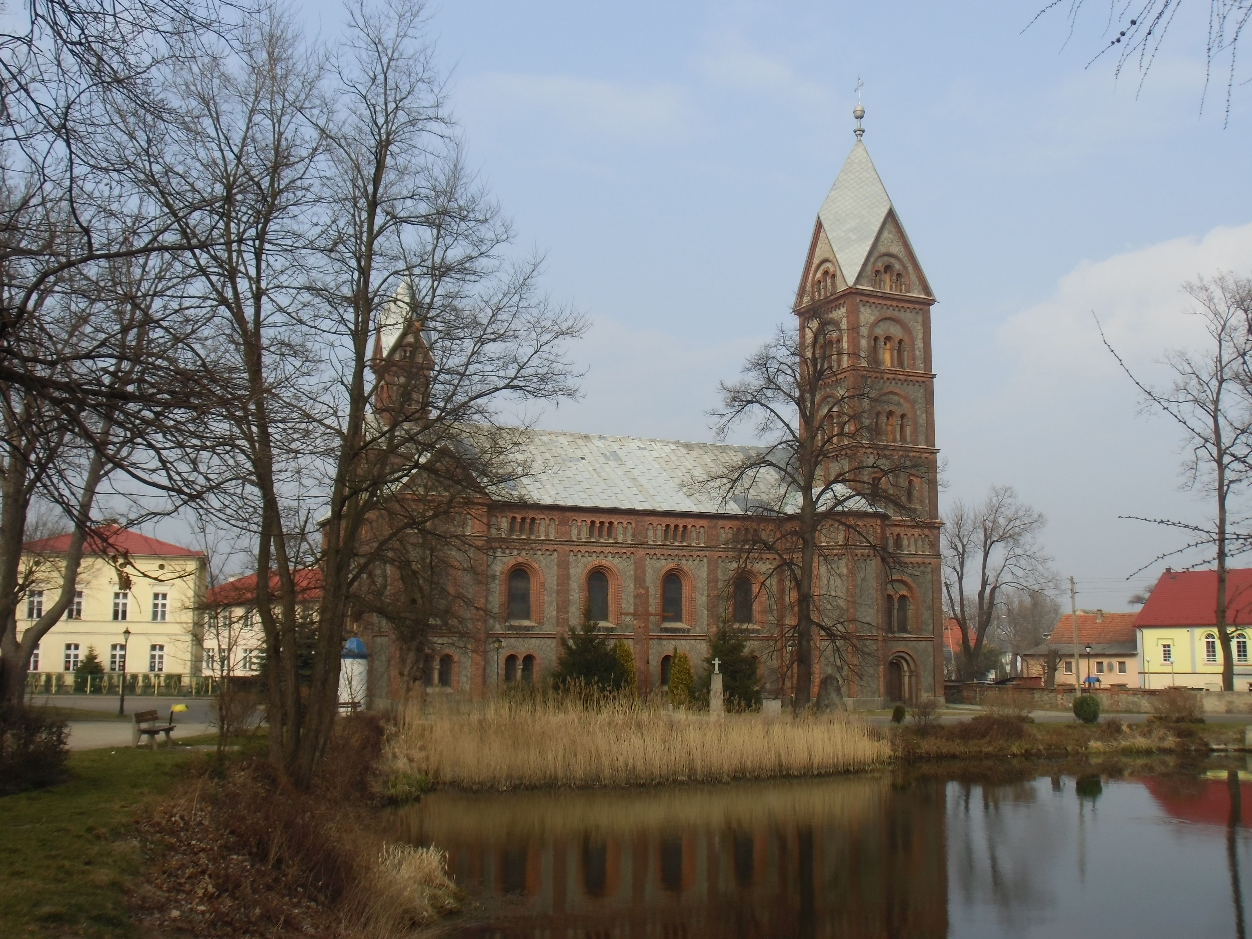 Roztoka, kościół par. p.w. św. Stanisława, XV, XVII (brak w wykazie WUOZ)